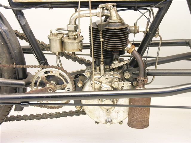 Fafnir 500 cc ioe engine in a Waddington forecar tricycle from circa 1905, see File:Waddington Fafnir 500 cc ioe forecar 1905.jpg.